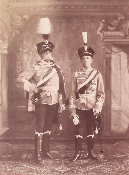 Fotografia ritraente S.M. Re Umberto I e il Principe di Napoli Vittorio Emanuele (III)